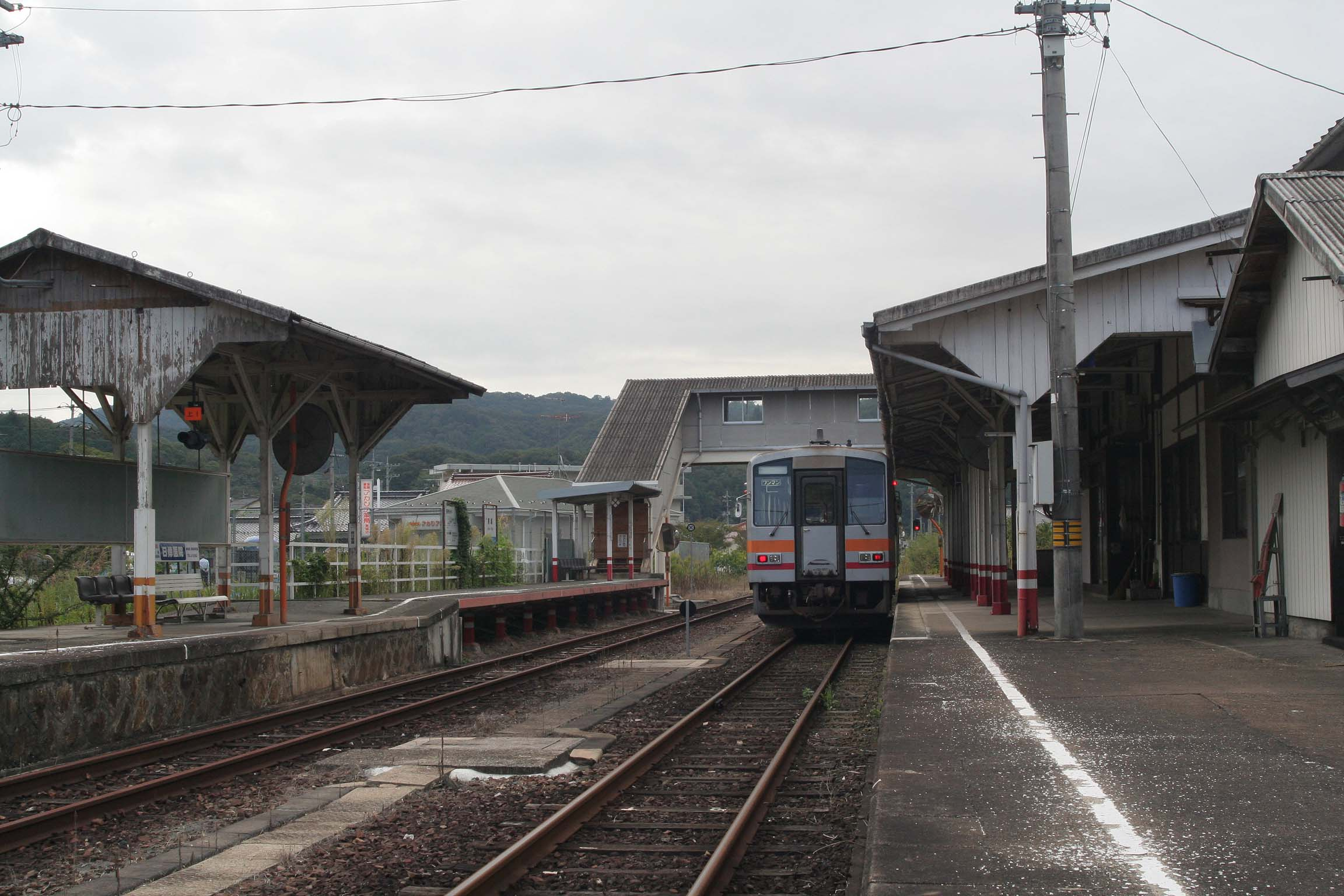 西日本旅客鉄道 東城駅の構内